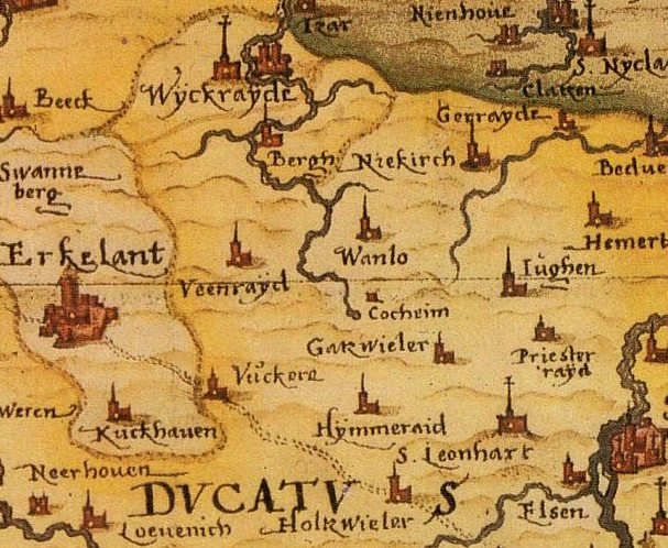 Die durch den Braunkohletagebau verschwundenen Ortschaften Garzweiler und Priesterath auf einem Kartenausschnitt von Christian Sgrothen von 1557; Detail from an Atlas (1557) of the german cartographer Christian Sgrothen (1525-1604). This part of the map shows Towns and villages around the former german village Garzweiler and Priesterath